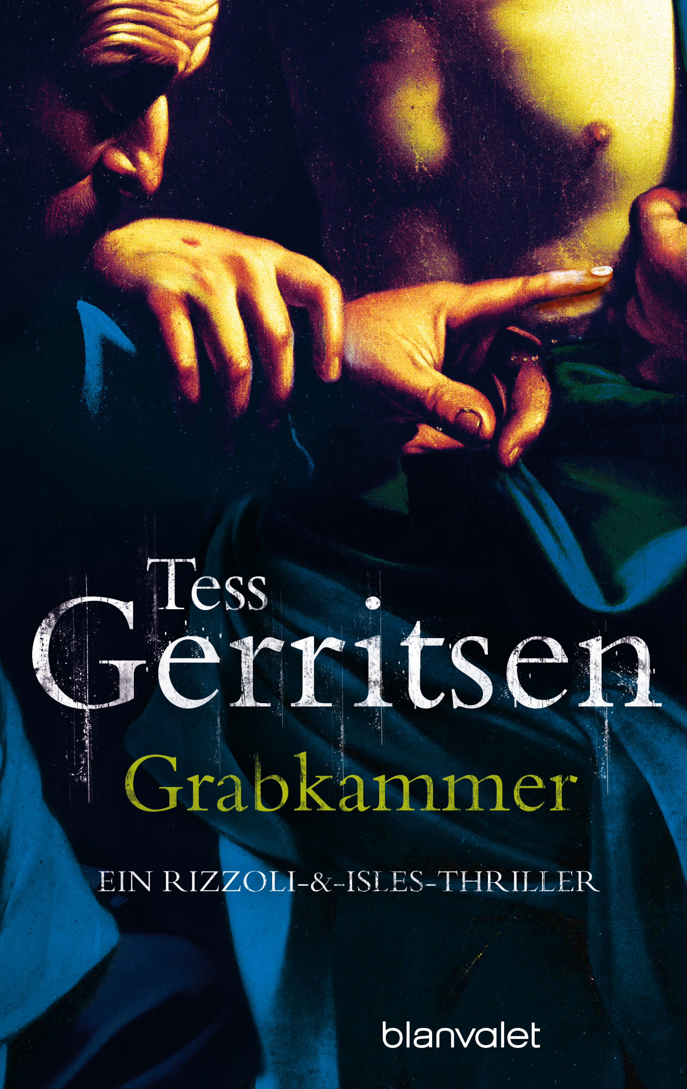 Tess Gerritsen: Grabkammer. Blanvalet, München 2011. DNB